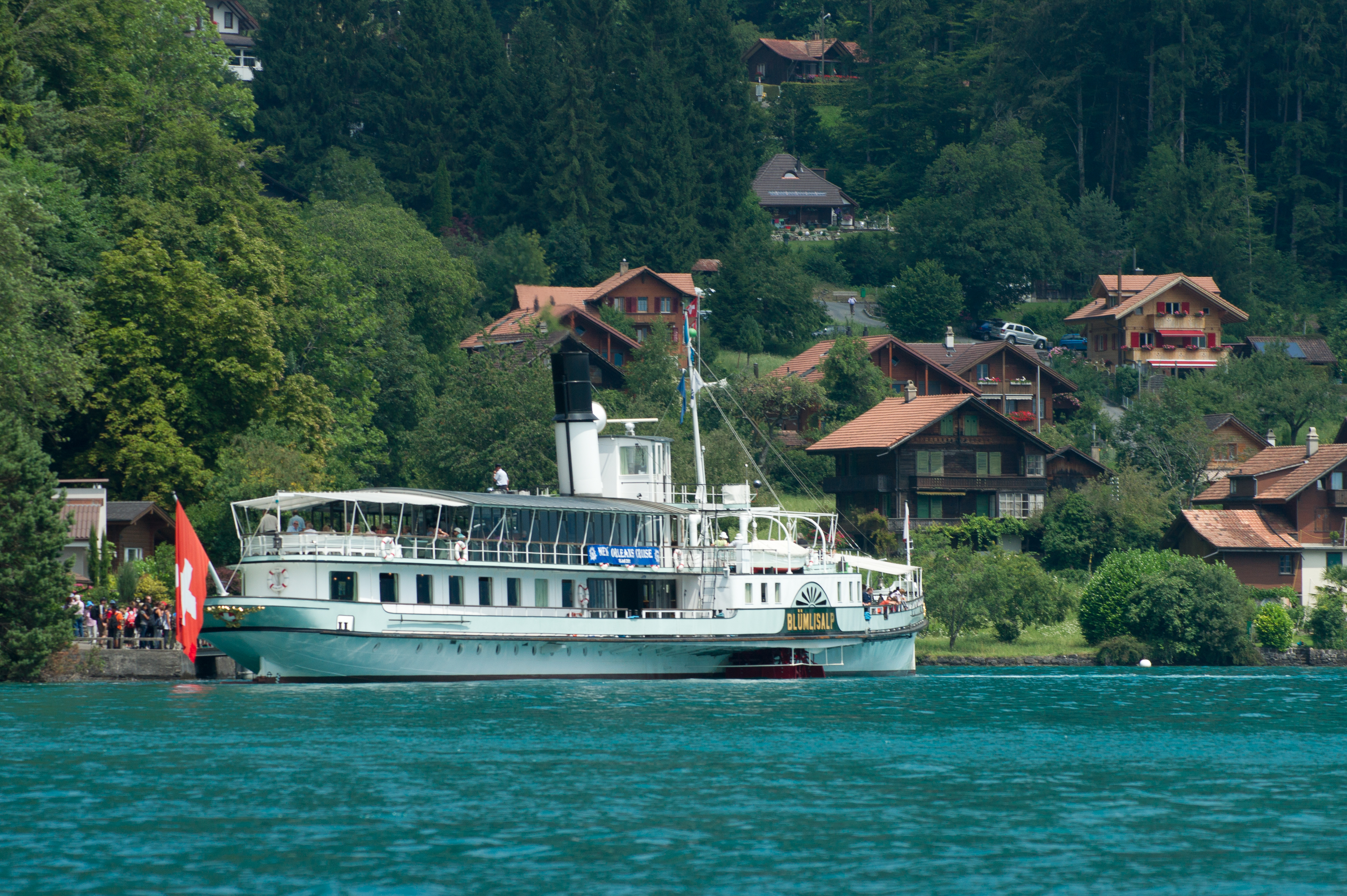 Le Blümisalp sur le lac de Thoune.